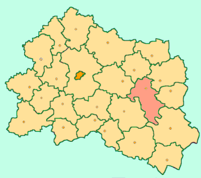 Orel Oblast map by Al Silonov Карта районов Орловской области